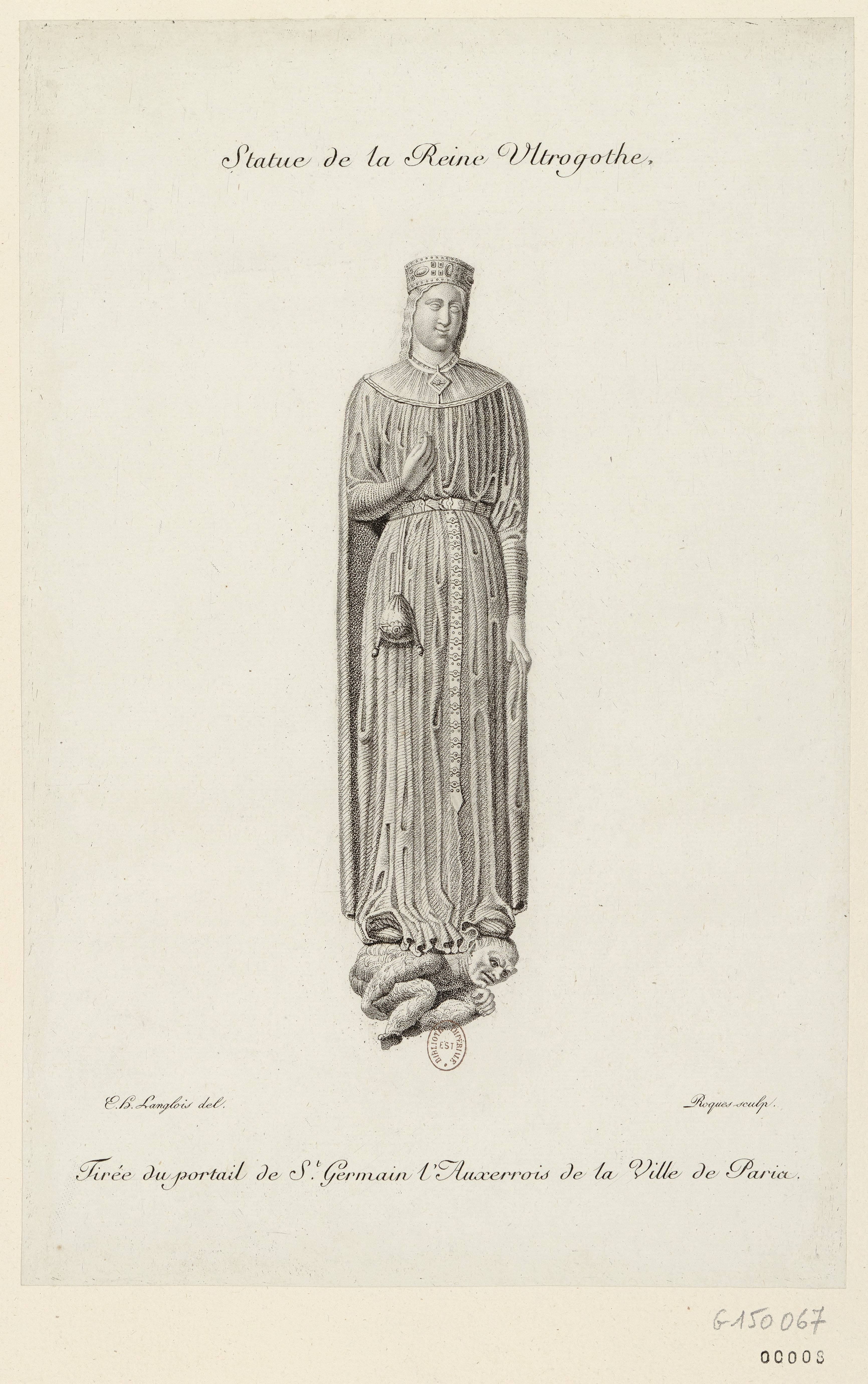 Statue de la reine Ultrogothe, tirée du portail de Saint-Germain-l'Auxerrois de la ville de Paris : [estampe].